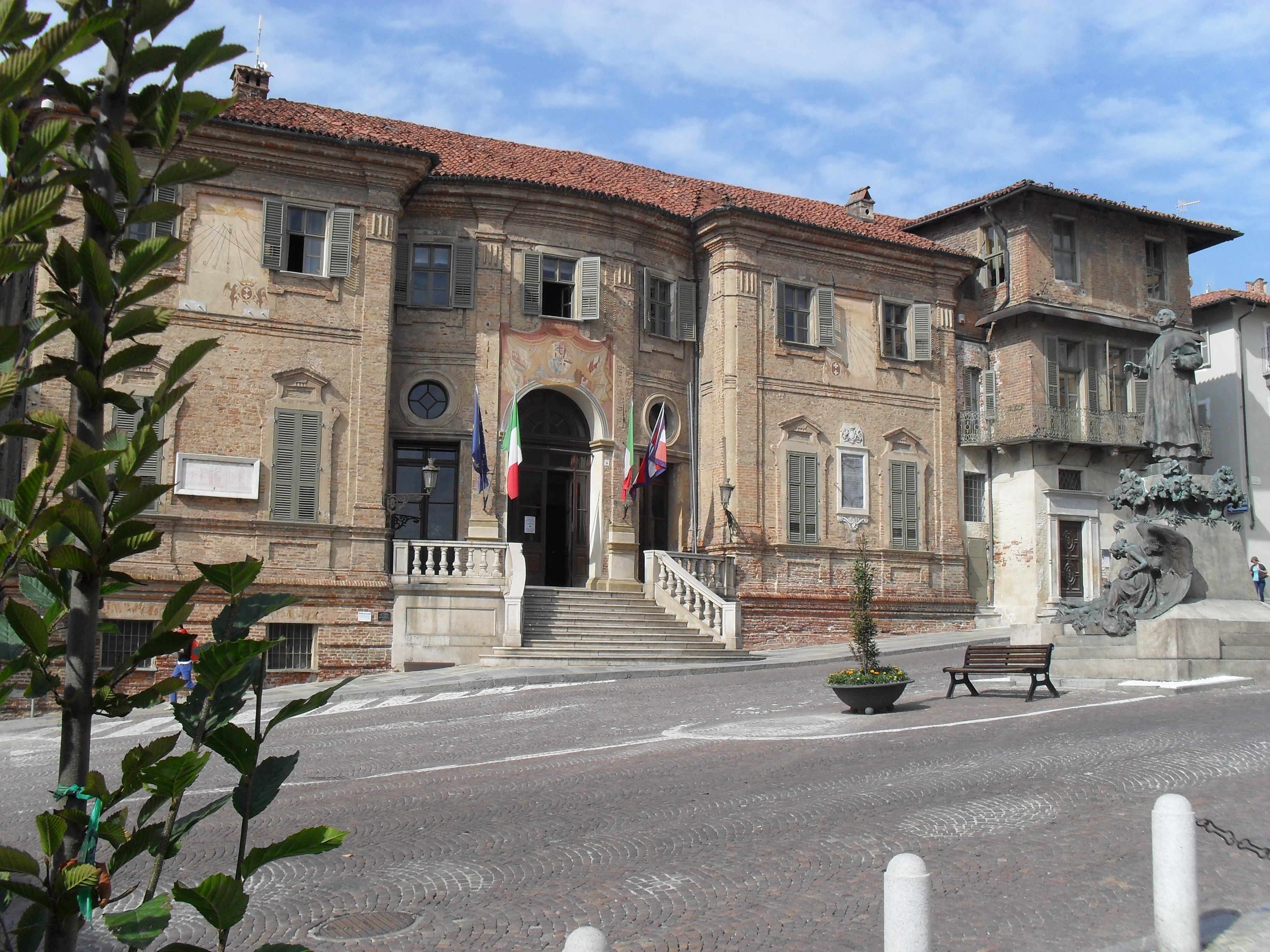 Palazzo Comunale This is a photo of a monument which is part of cultural heritage of Italy.